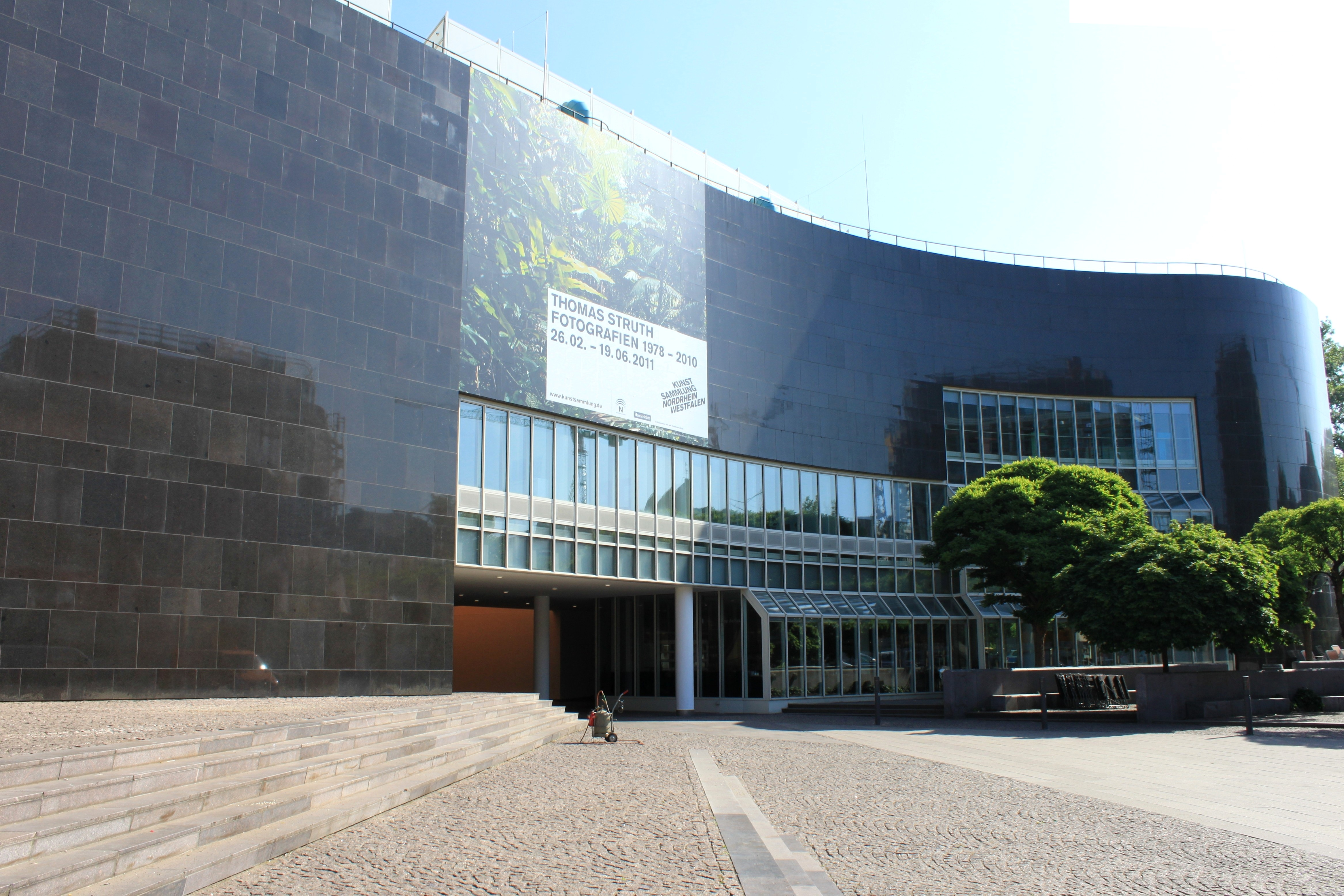 Horizontale Außenansicht K20